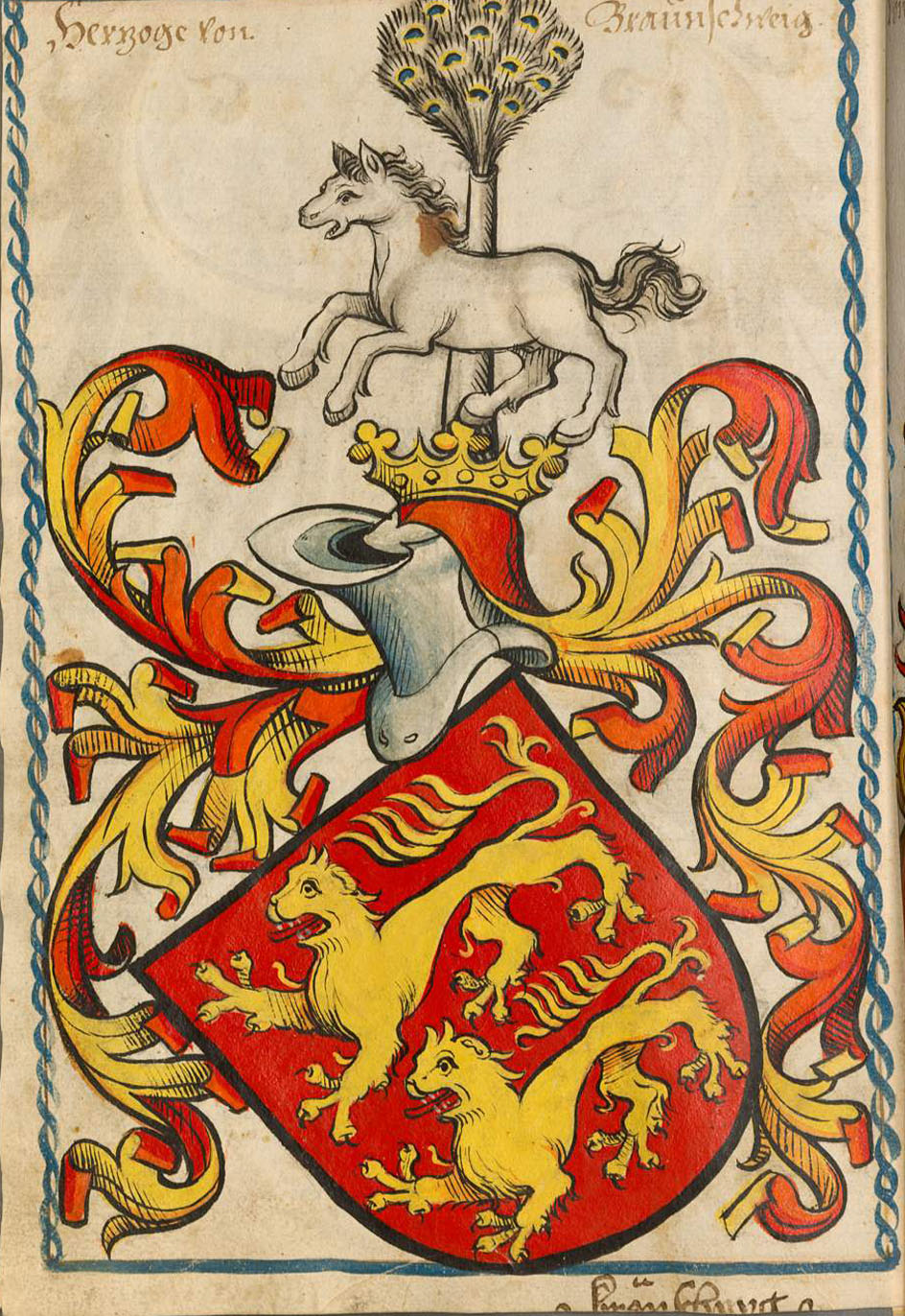 Scheibler'sches Wappenbuch , älterer Teil Herzog von Braunschweig